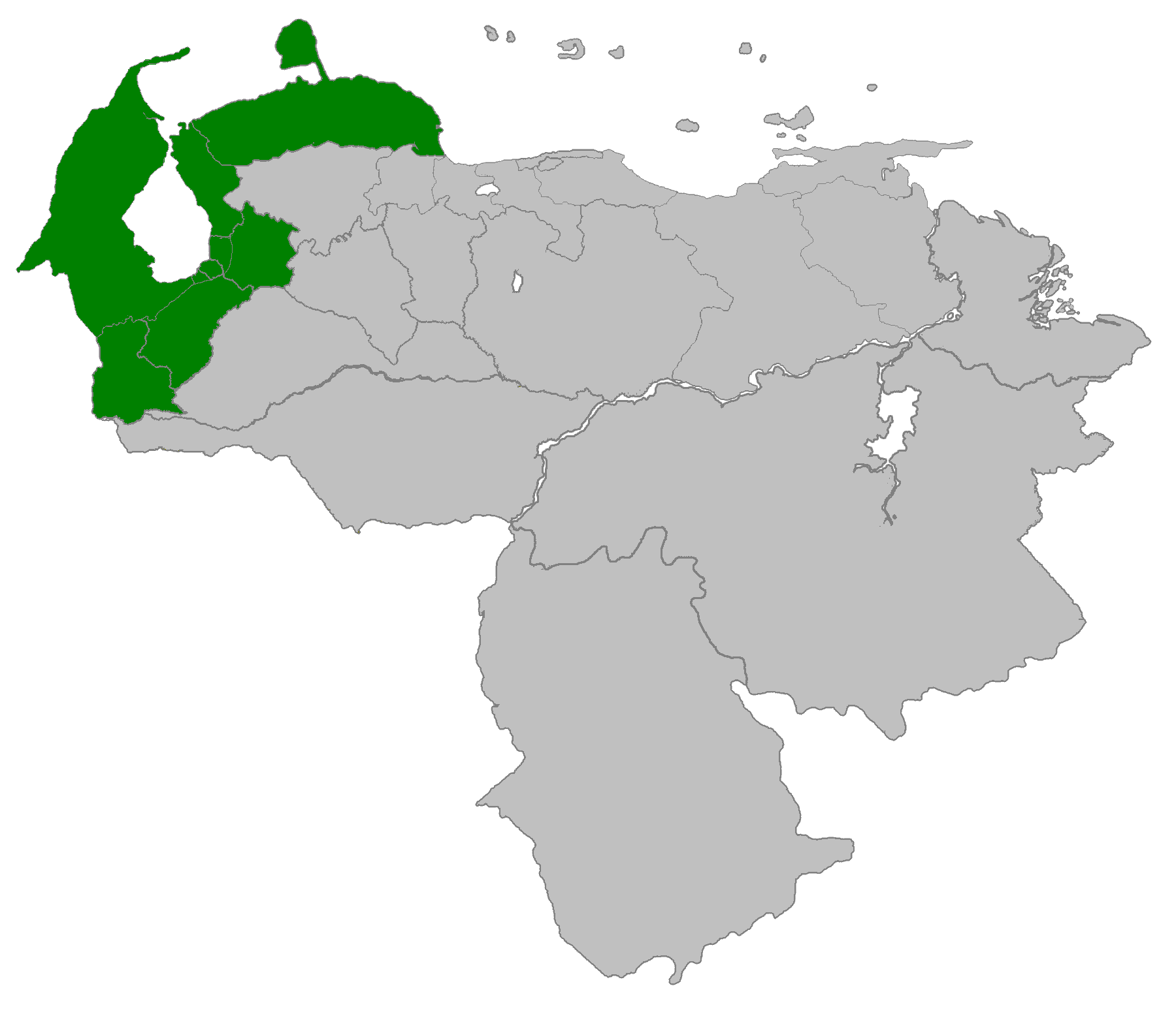 Ubicación del Departamento Zulia de la Gran Colombia 1823 - 1830